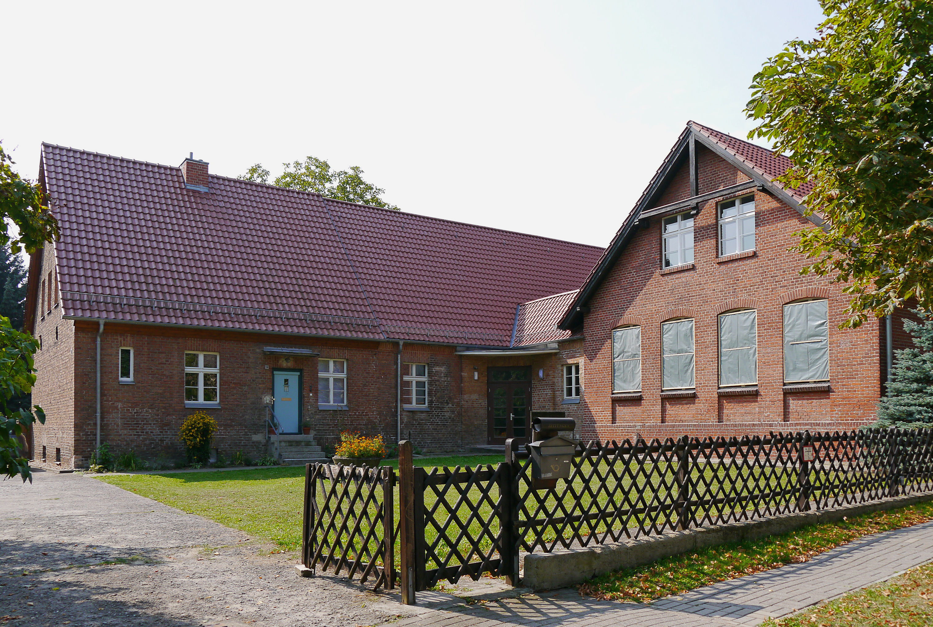 Baudenkmal: Wilhelm-Pieck-Straße 14, Sputendorf, Dorfschule mit Lehrerwohnung